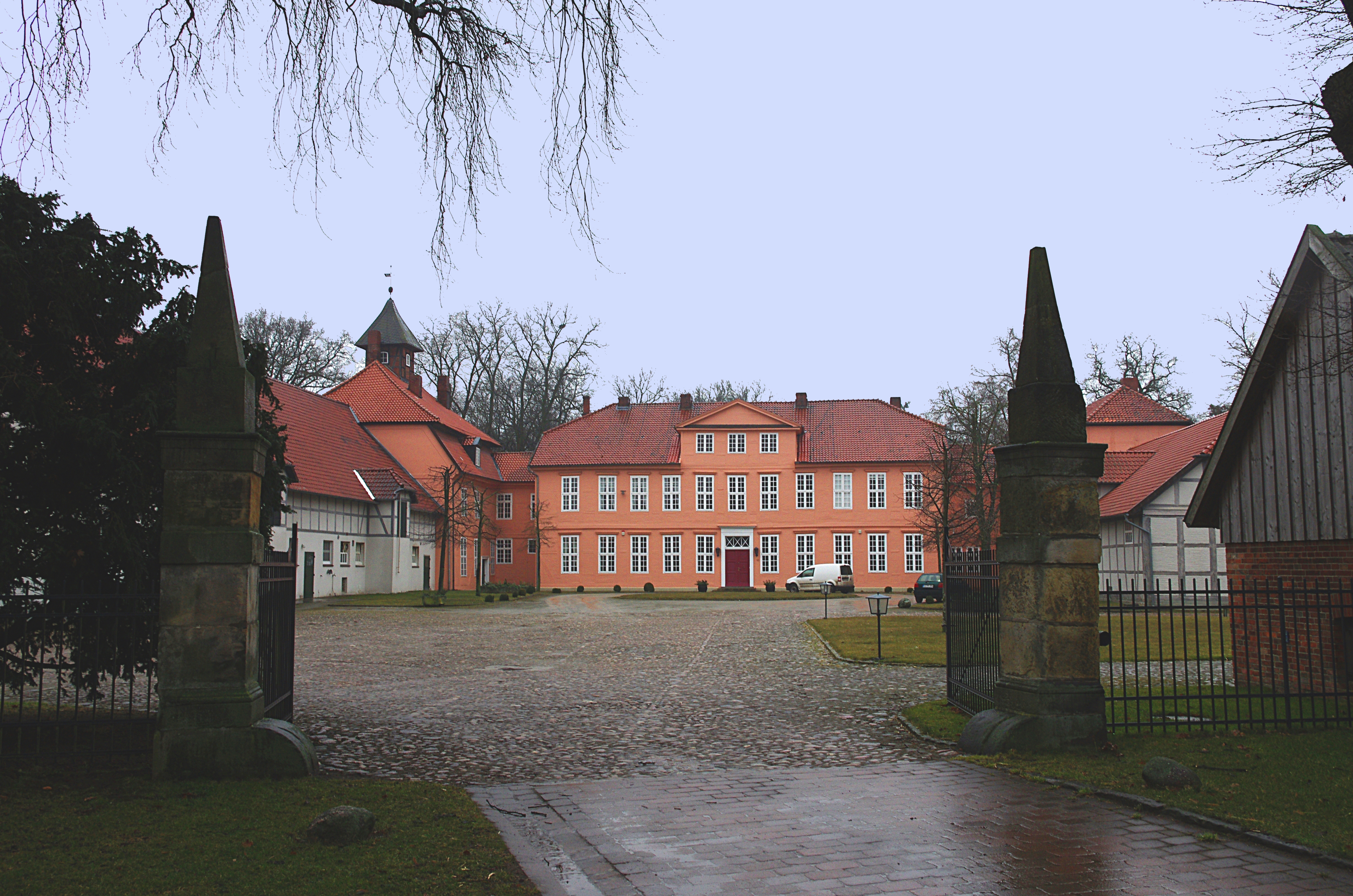 Langlingen im Landkreis Celle. Das Gutshaus steht unter Denkmalschutz.